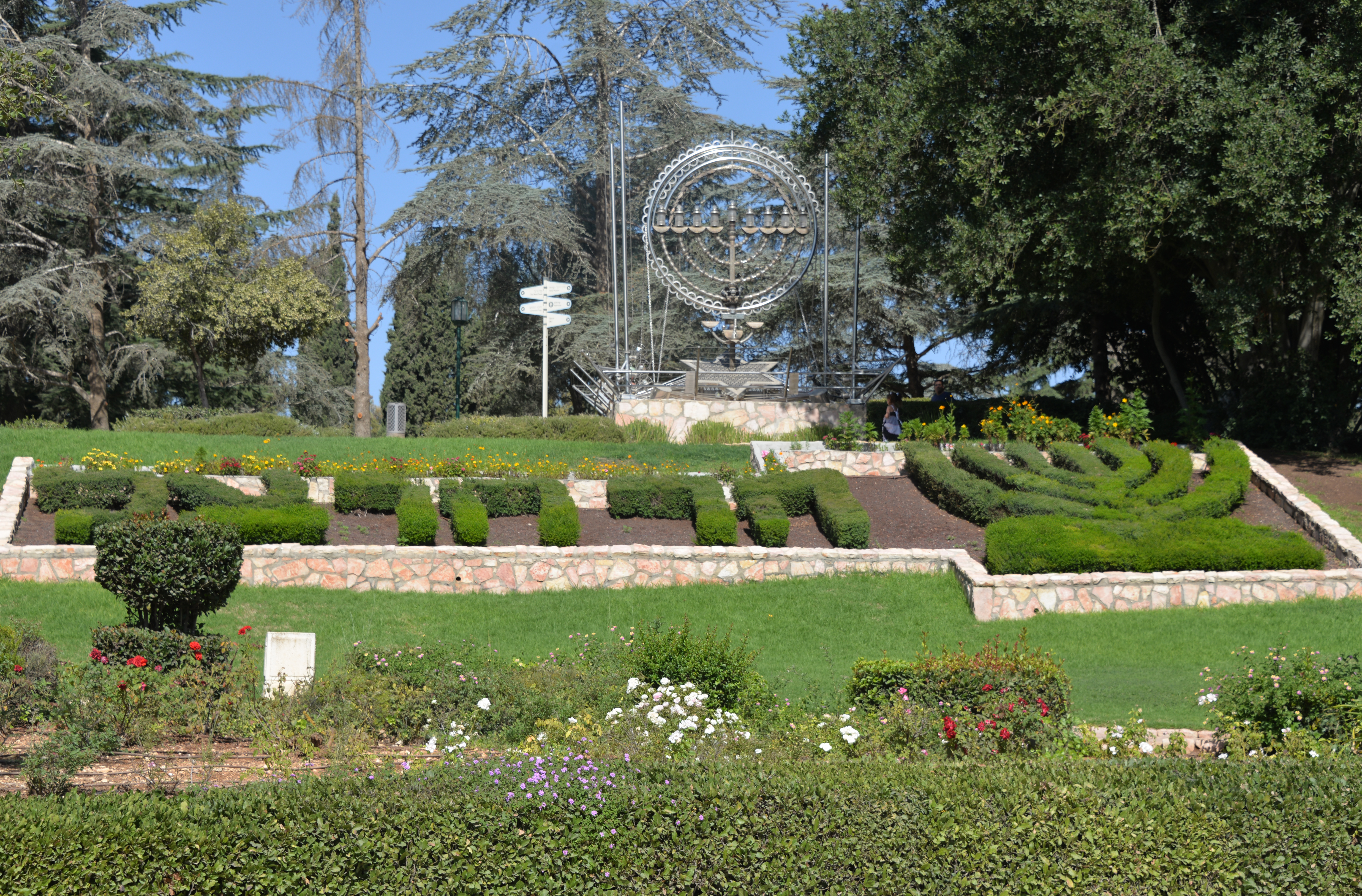 המילים "הר הרצל" מעוצבות בצמחיה בכניסה להר